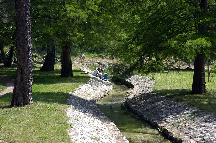 Public Garden Vrulje in Zadar